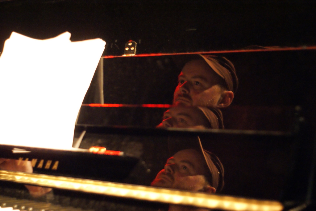 Motif, Jazz Fest Brno, Metro Music Bar